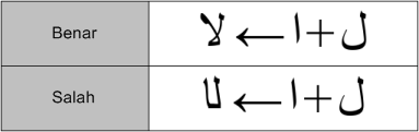 Ligatur arab lam alif (لا).